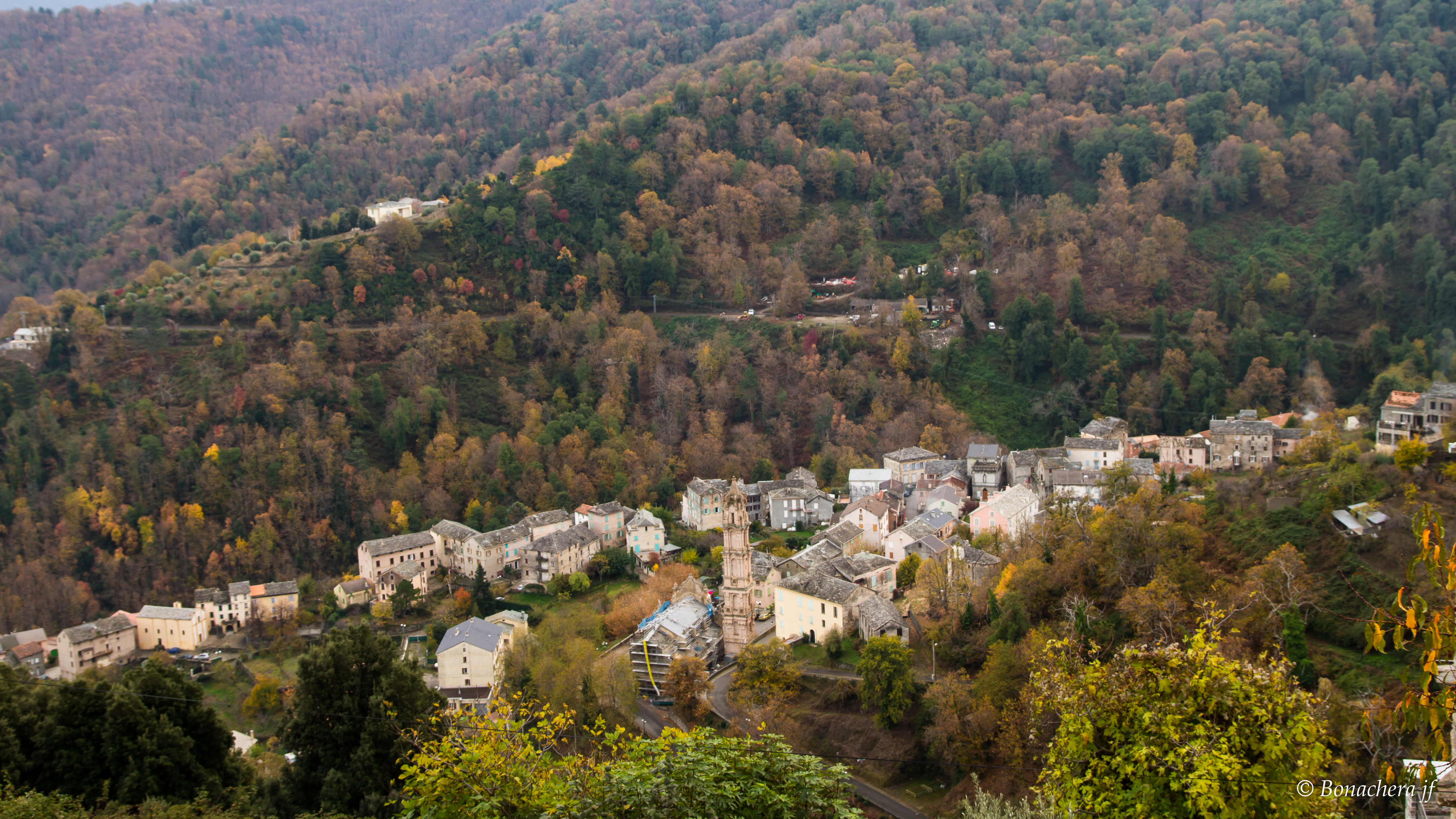 A Porta d'Ampugnani, vue depuis le village de Quercitellu